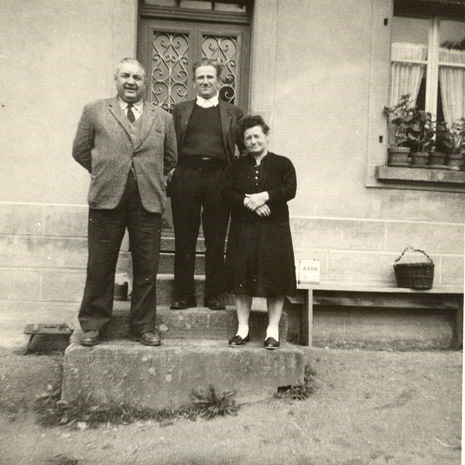 Rombach-le-Franc: Paul Maurer (à gauche), Michel Perroti (au centre) et la femme de Paul Maurer - Cliché pris en 1962 devant la ferme de Pierreureusegoutte